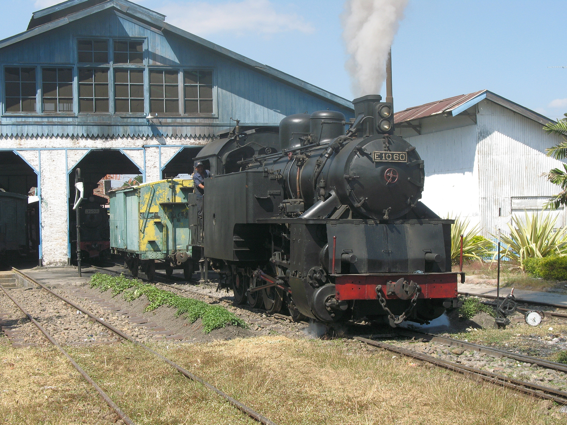 DKA E10 (E 10 60 D)